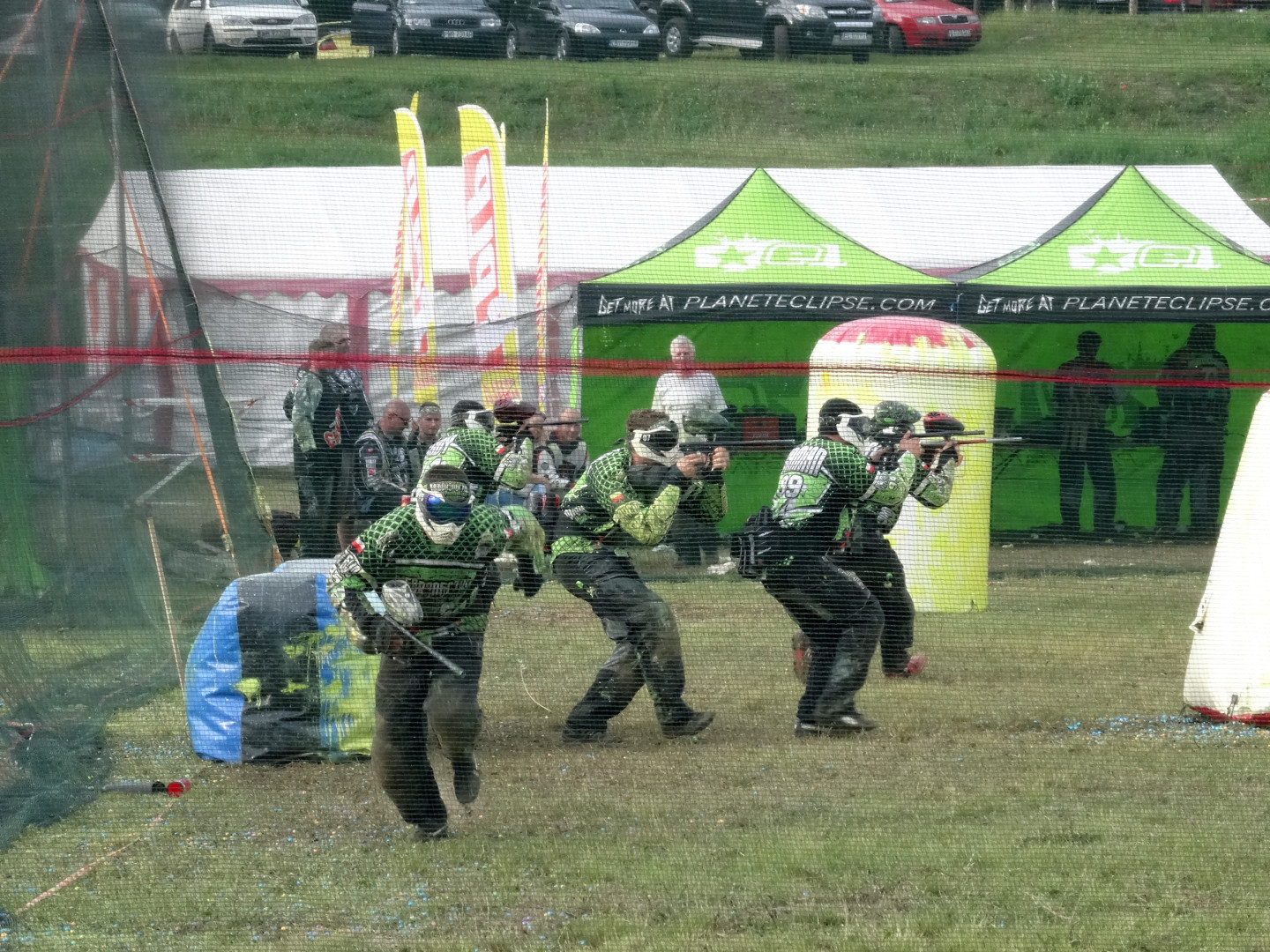 Zawody paintball w Bydgoszczy-Myślęcinku